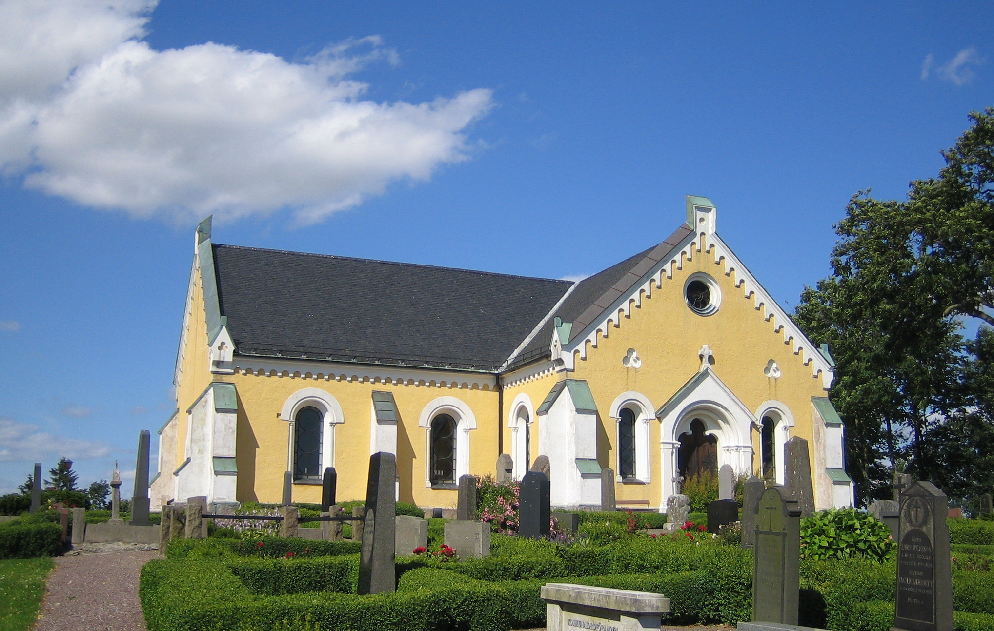 Villie kyrka.